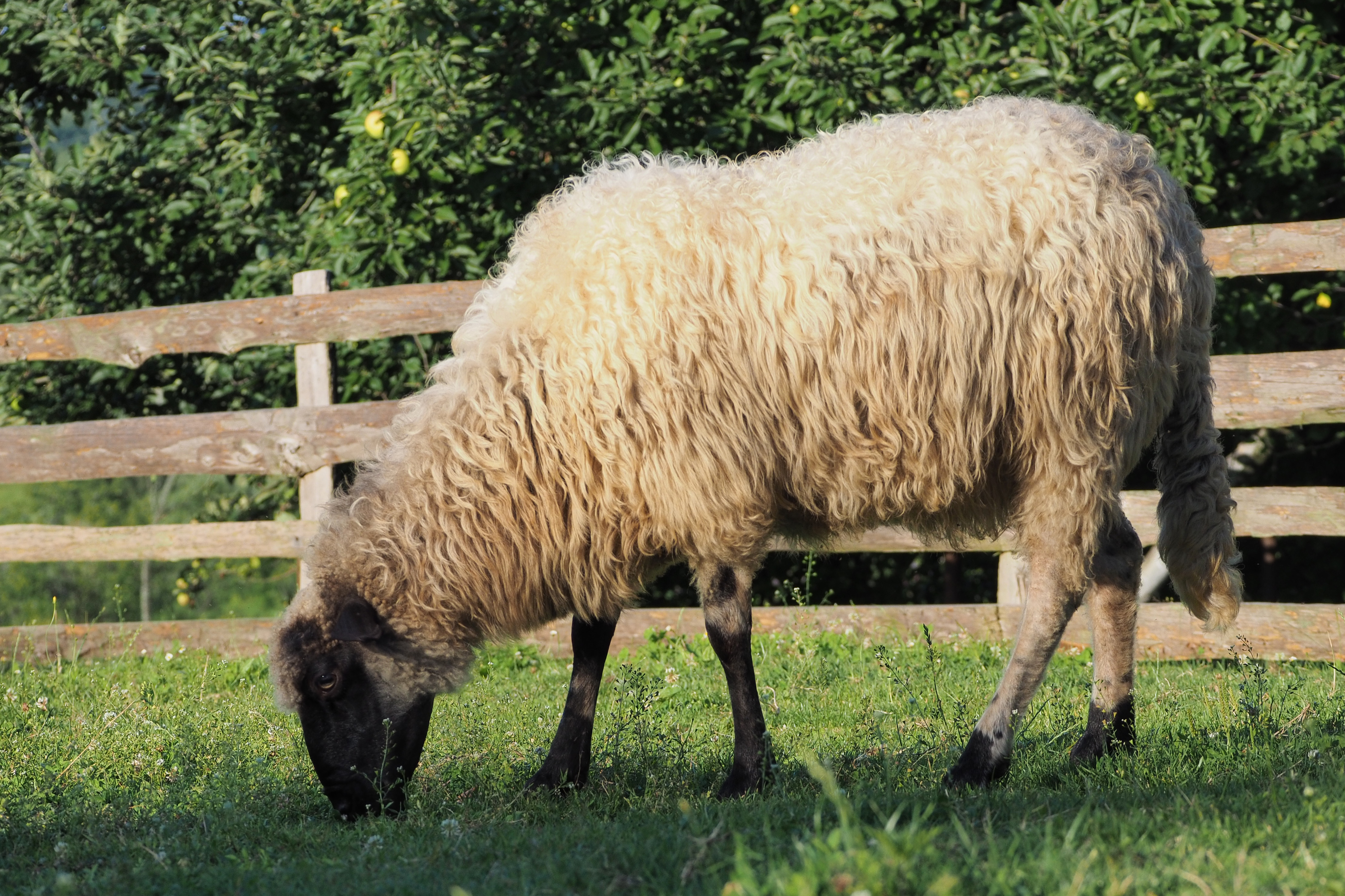 Srpski (latinica): Pramenka (Bosna)